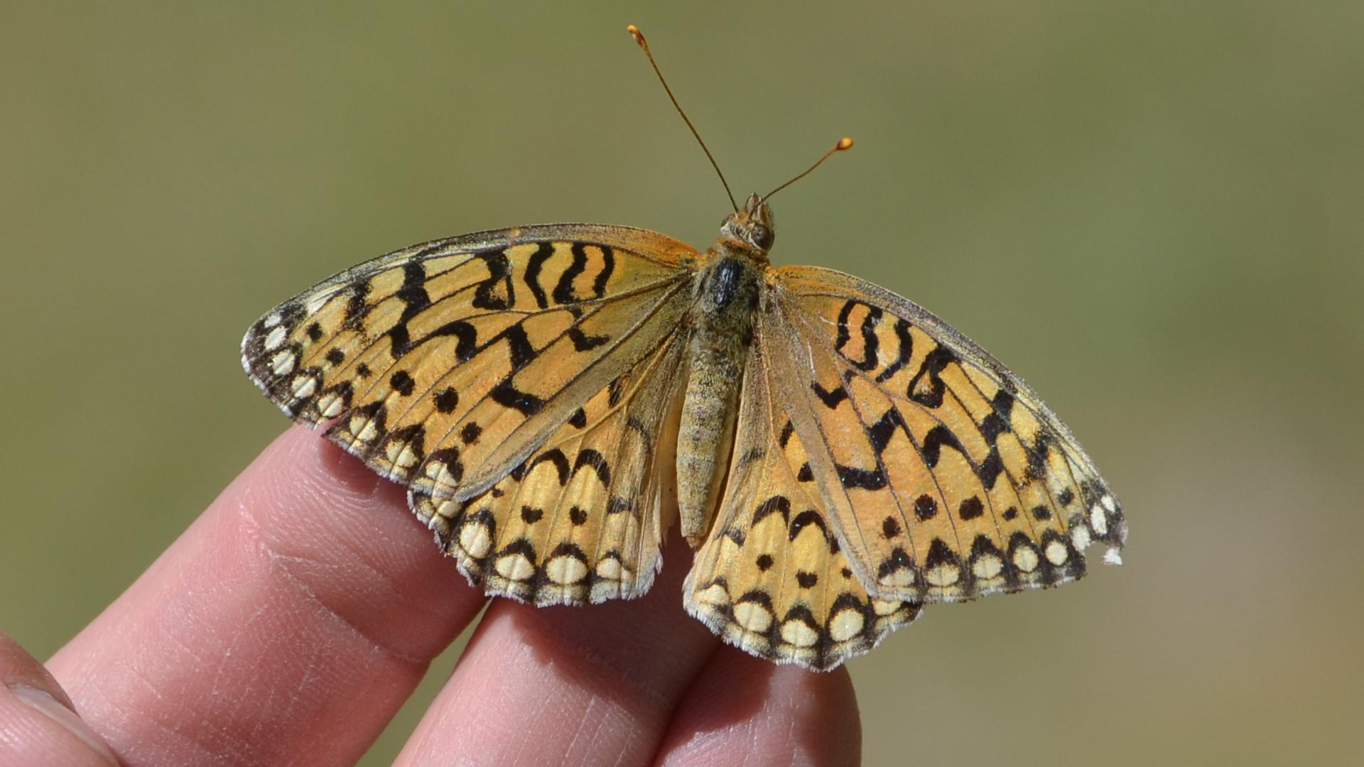 Oregon 2014